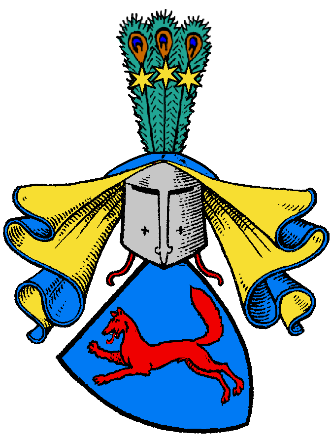 Stammwappen der ritterbürtigen von Brockhusen, in einigen Zweigen des Geschlechts auch Brockhausen oder Bruchhausen genannt, eines Anfang des 13. Jahrhunderts über Mecklenburg nach Pommern eingewanderten ritterbürtigen Geschlechts mit Zweigen in Westfalen.